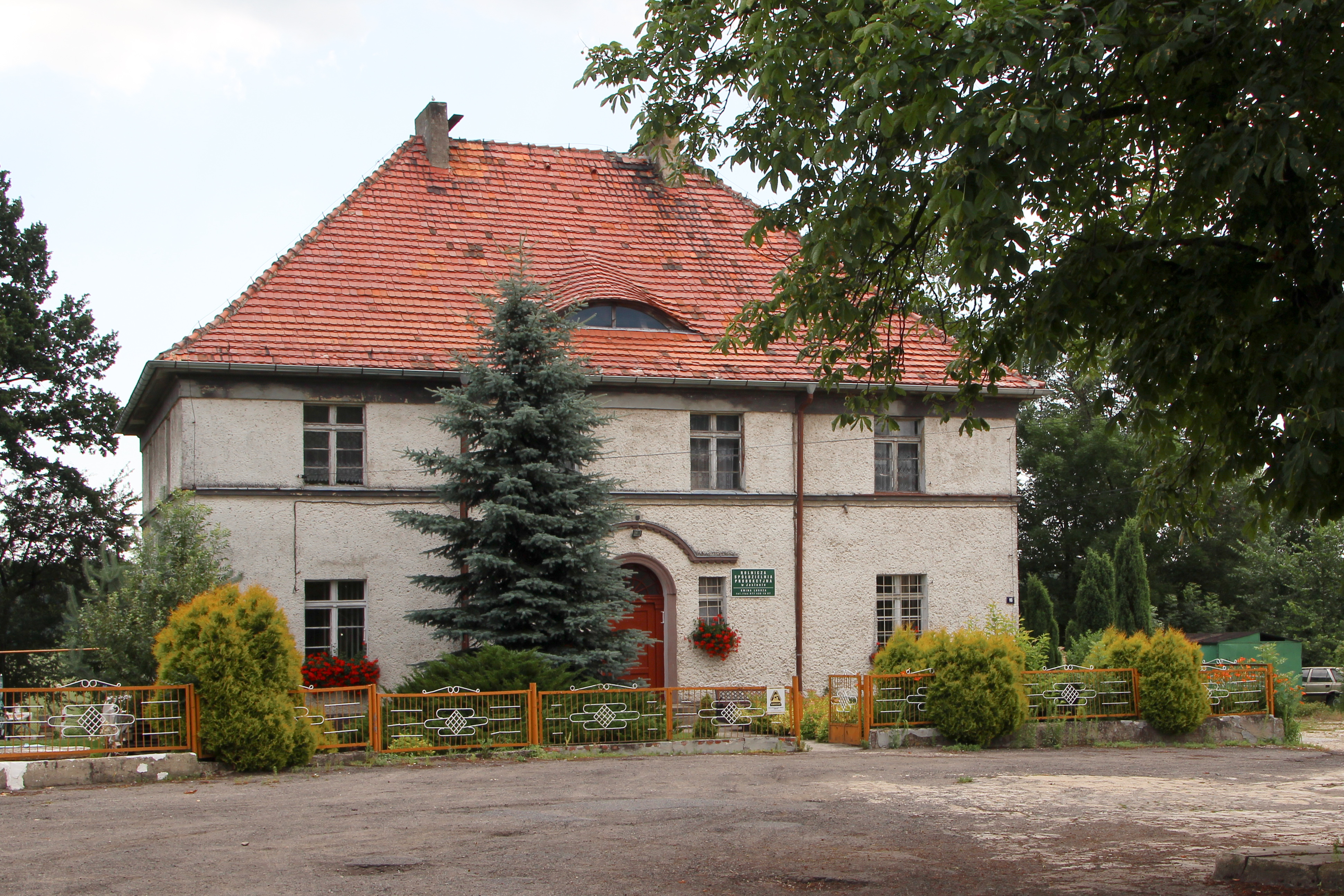 Jasiona -wieś w Polsce w województwie opolskim, w powiecie prudnickim w gminie Lubrza.